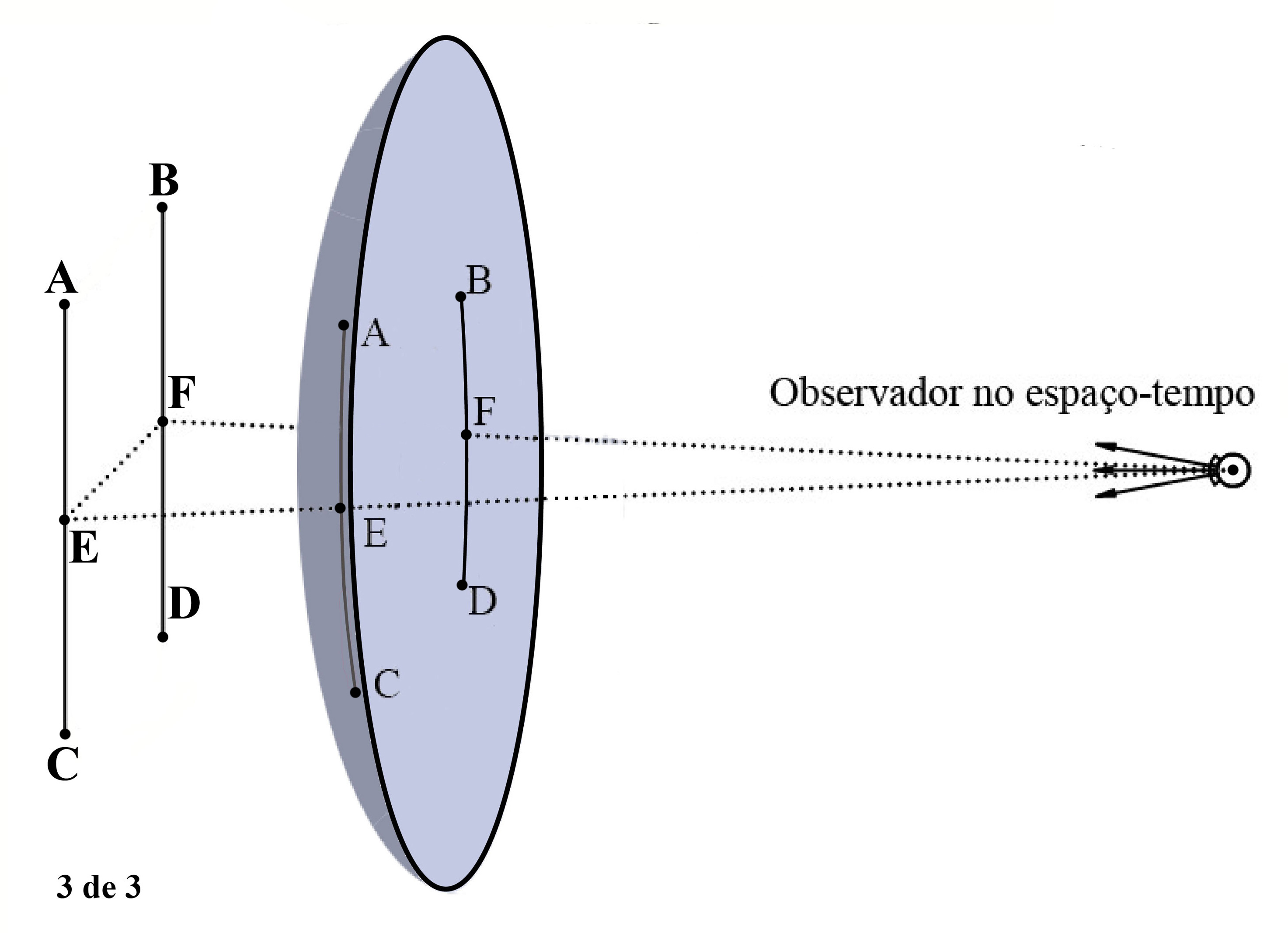 Sistema de projeção com observador móvel e plano de projeção com distância focal constante